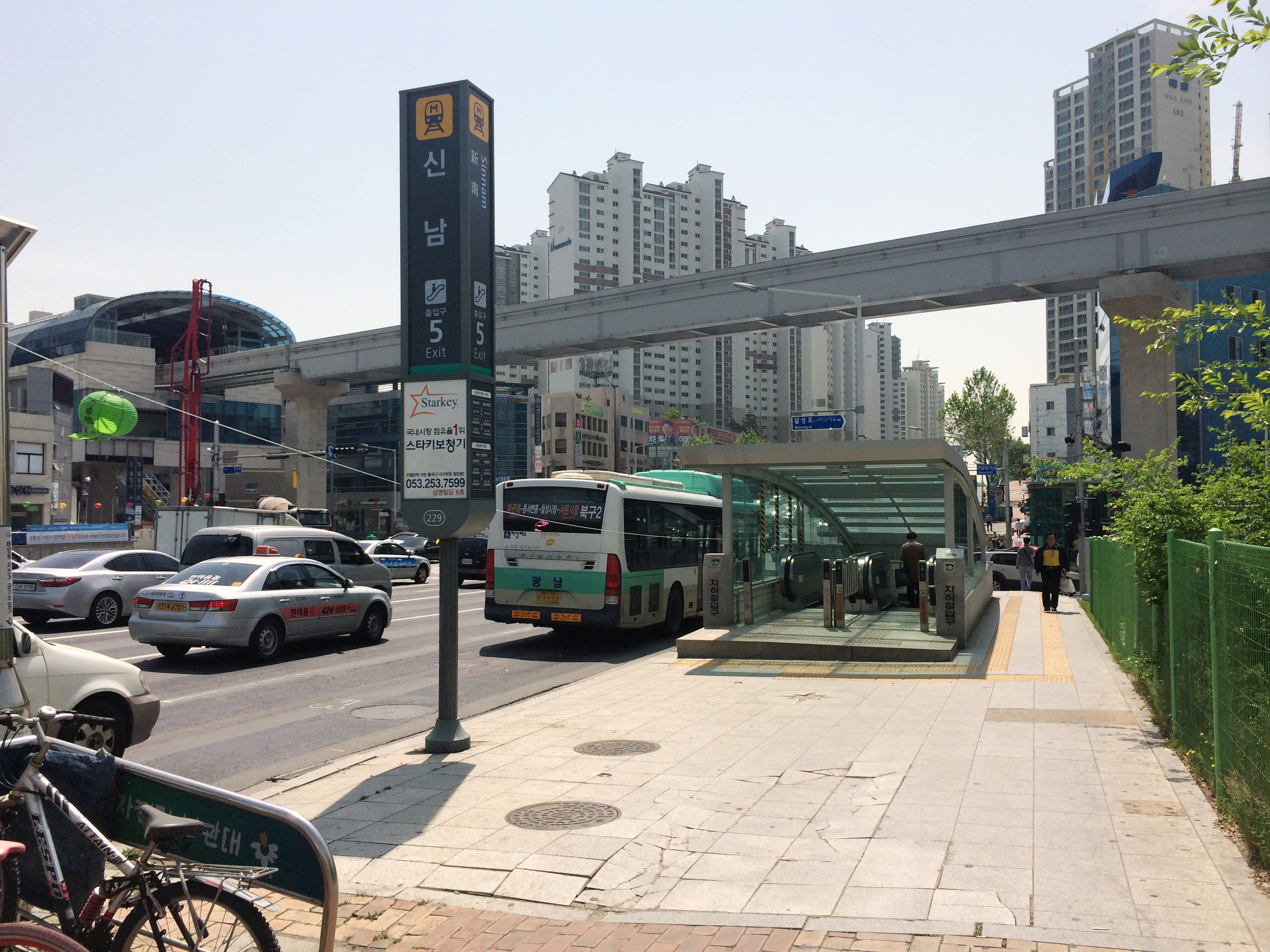 신남역 5번 출입구